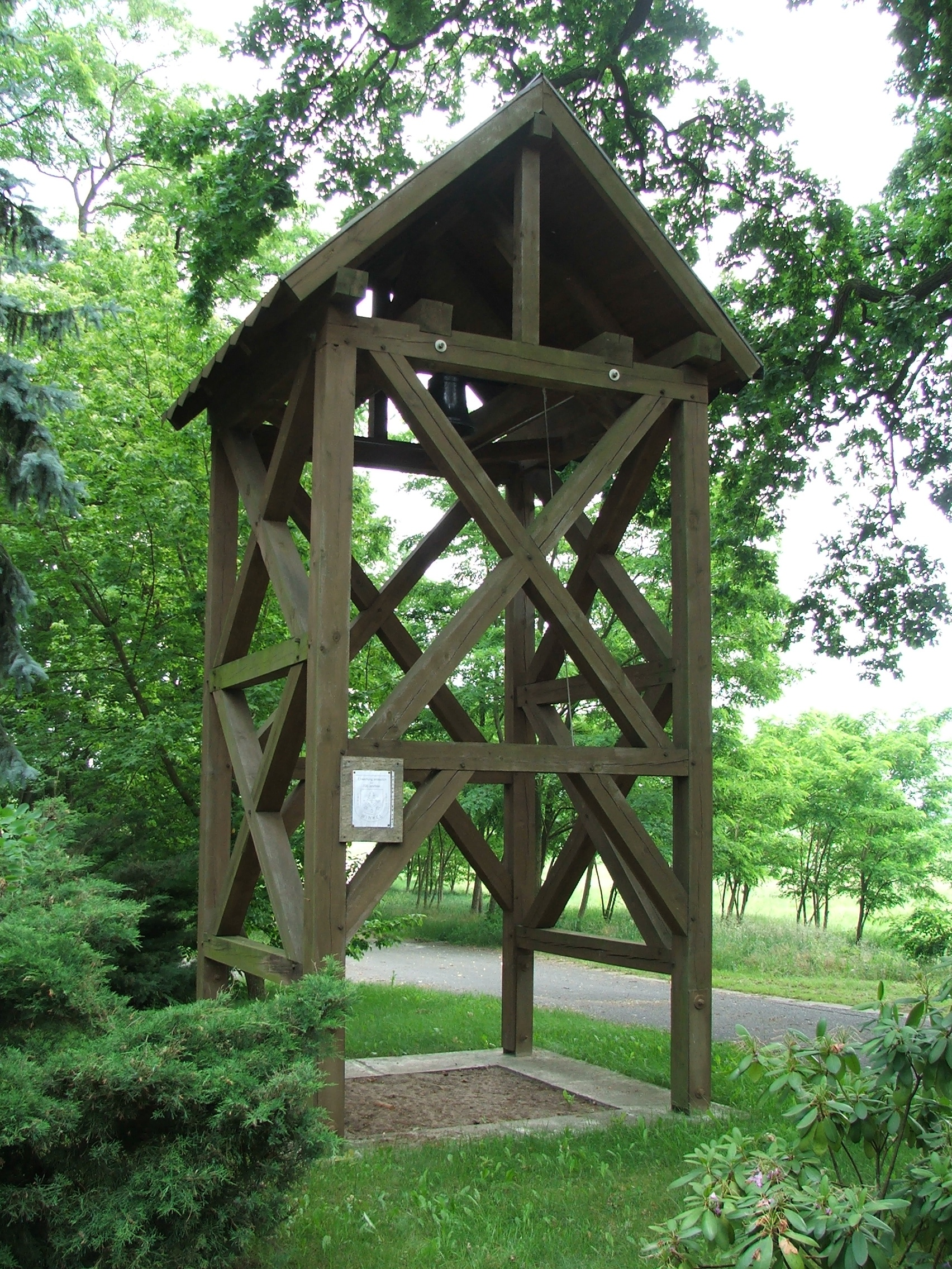 Glockenturmn Winkel